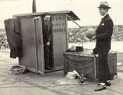 Han Hollander (rjochts) op 11 maart 1928 op it dak fan it Olympysk Stadion. De man yn it hokje is Willem de Vogt fan de AVRO. De foto is nommen by de wedstriid Nederlân - Belgje.